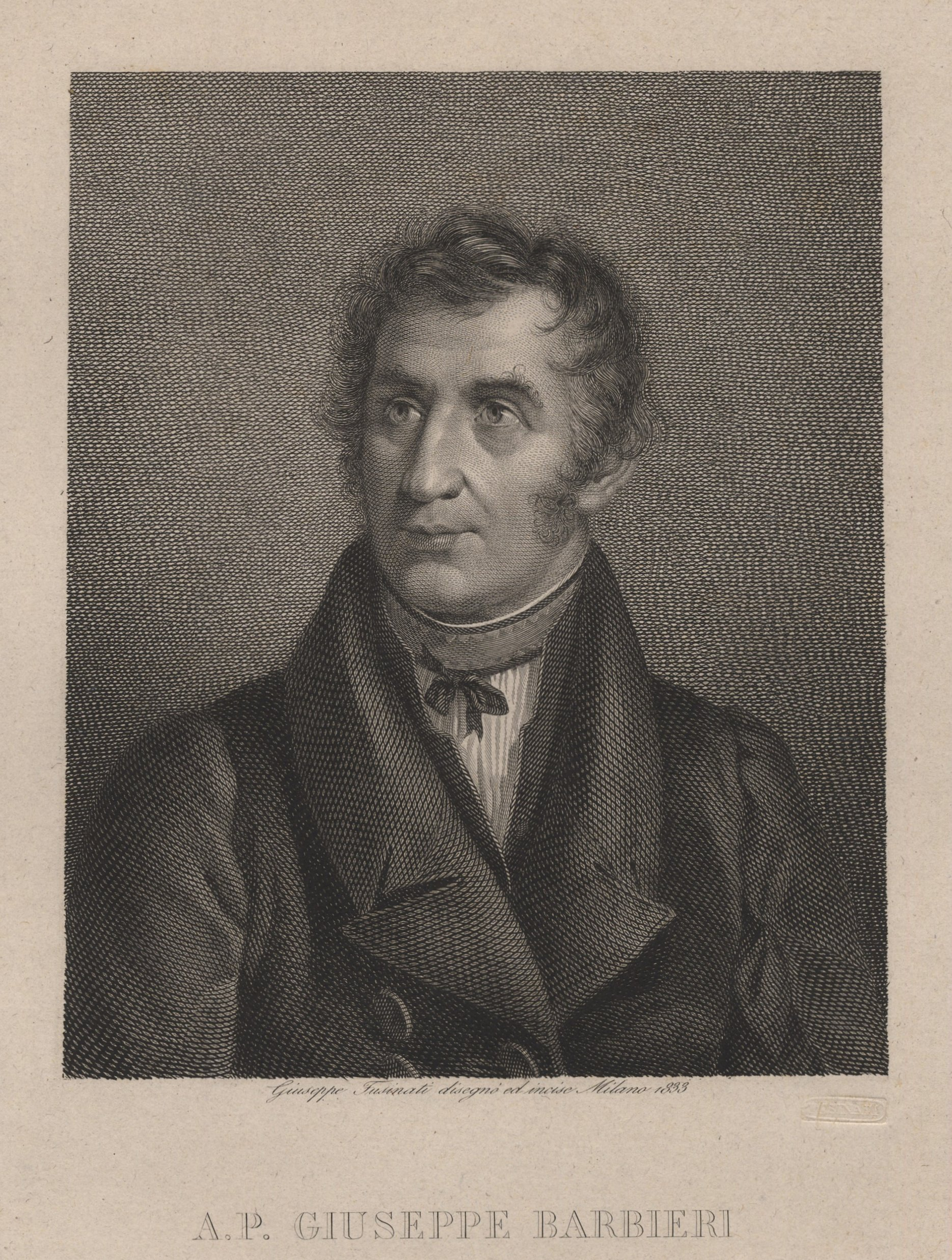 Kupferstich 1833, Portrait Giuseppe Barbieri gestochen von Giuseppe Fusinati